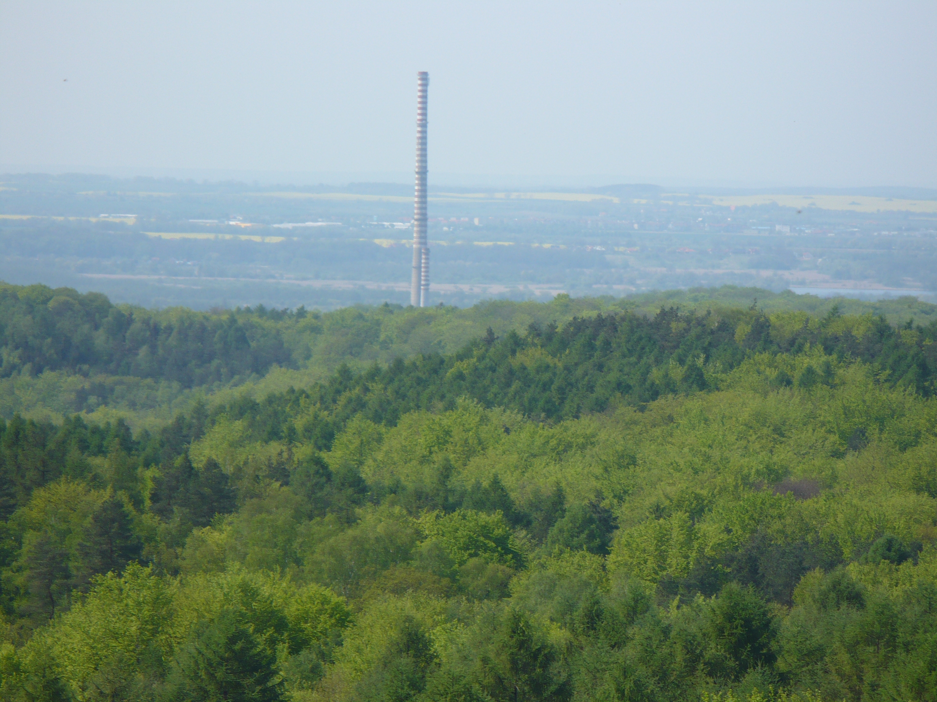 Komin dawnej fabryki tworzyw sztucznych w Szczecinie-Żydowcach.